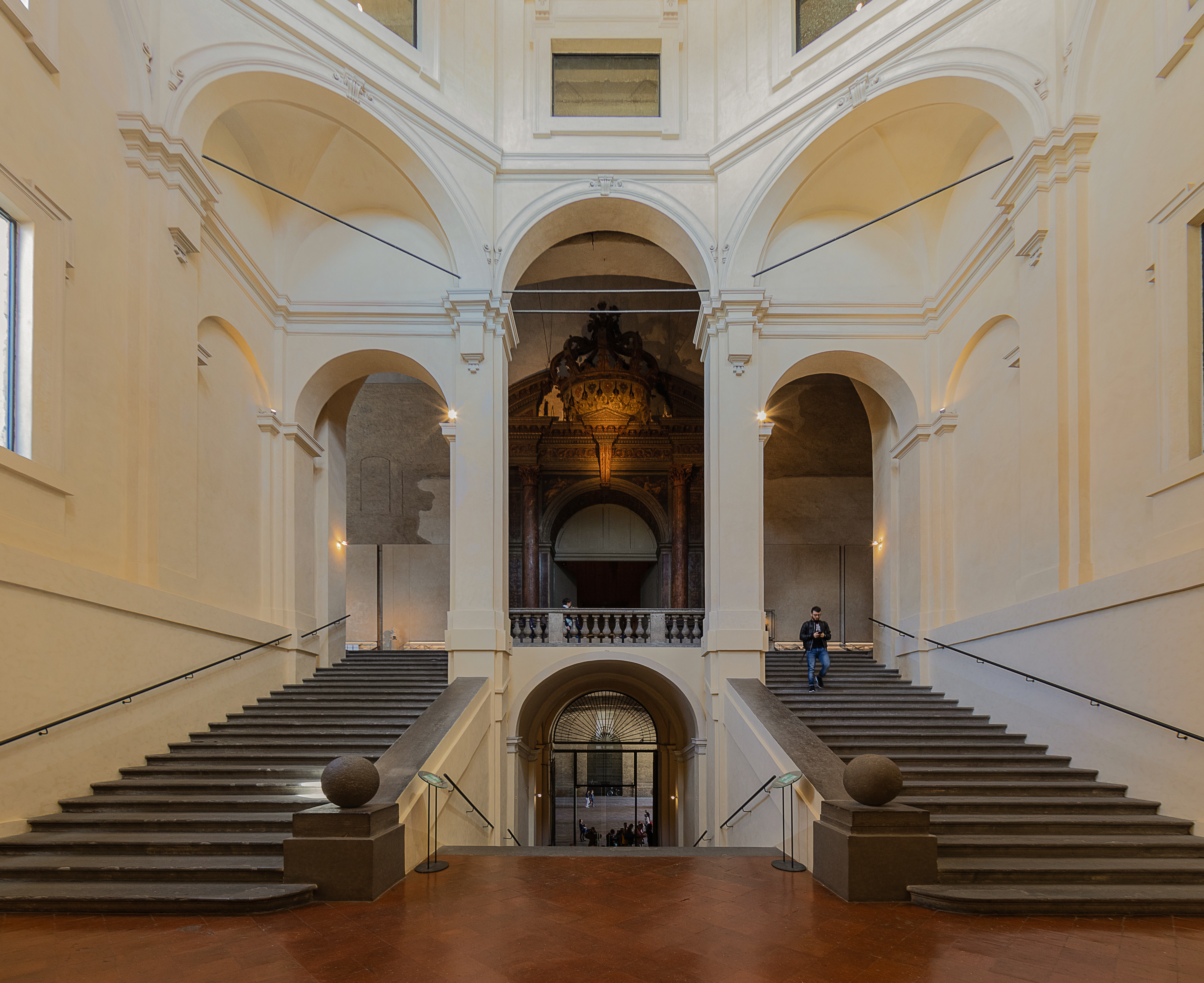 palazzo della Pilotta This is a photo of a monument which is part of cultural heritage of Italy.